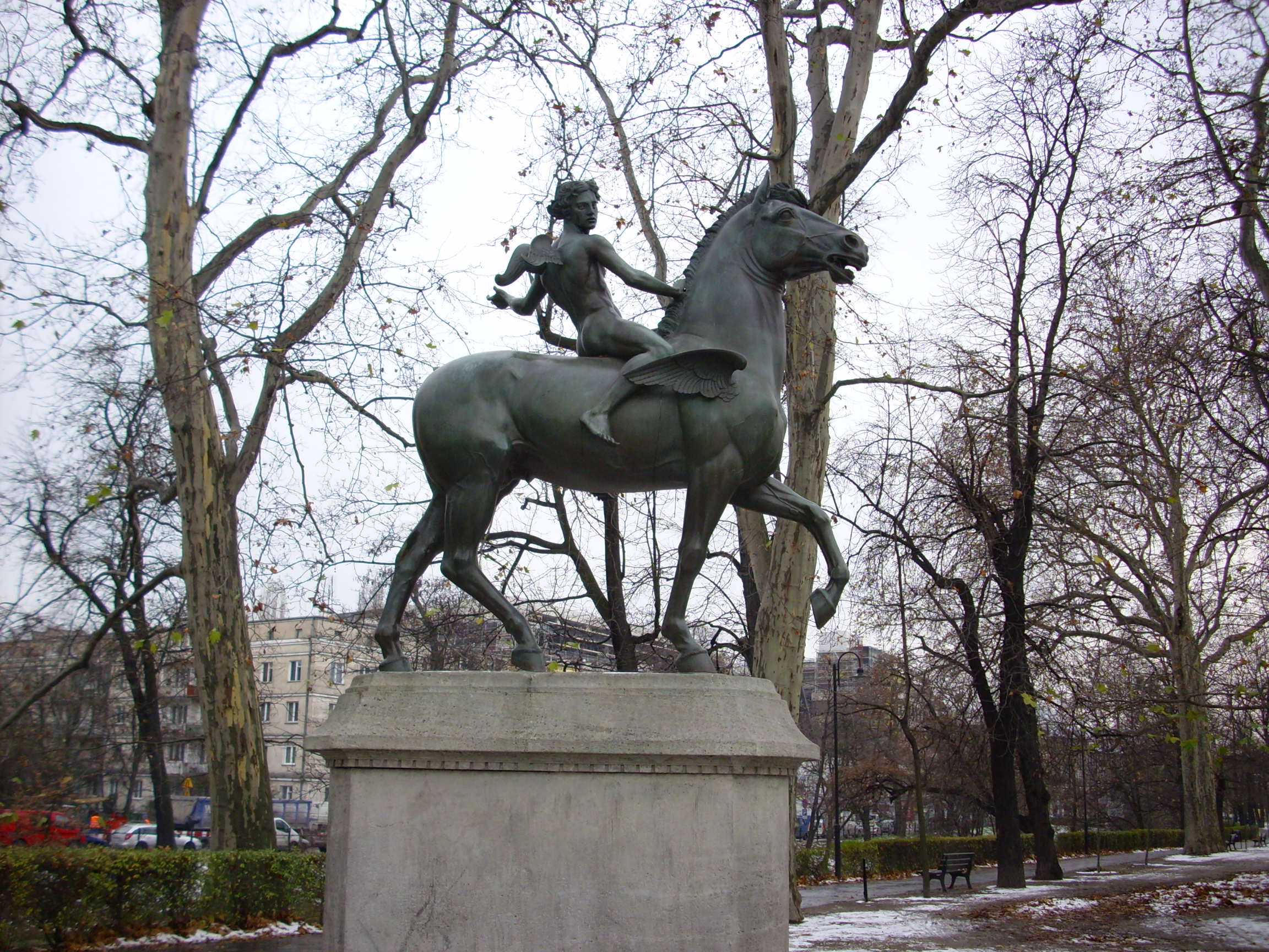 Wrocław, promenada nad fosą. Rzeźba „Amor na Pegazie” Theodora von Gosen.